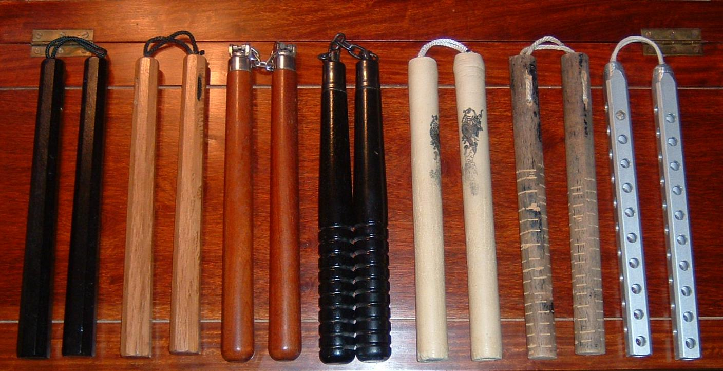 Das Nunchaku besteht aus zwei hölzern die mit einer Kette oder einer Schnur verbunden sind.